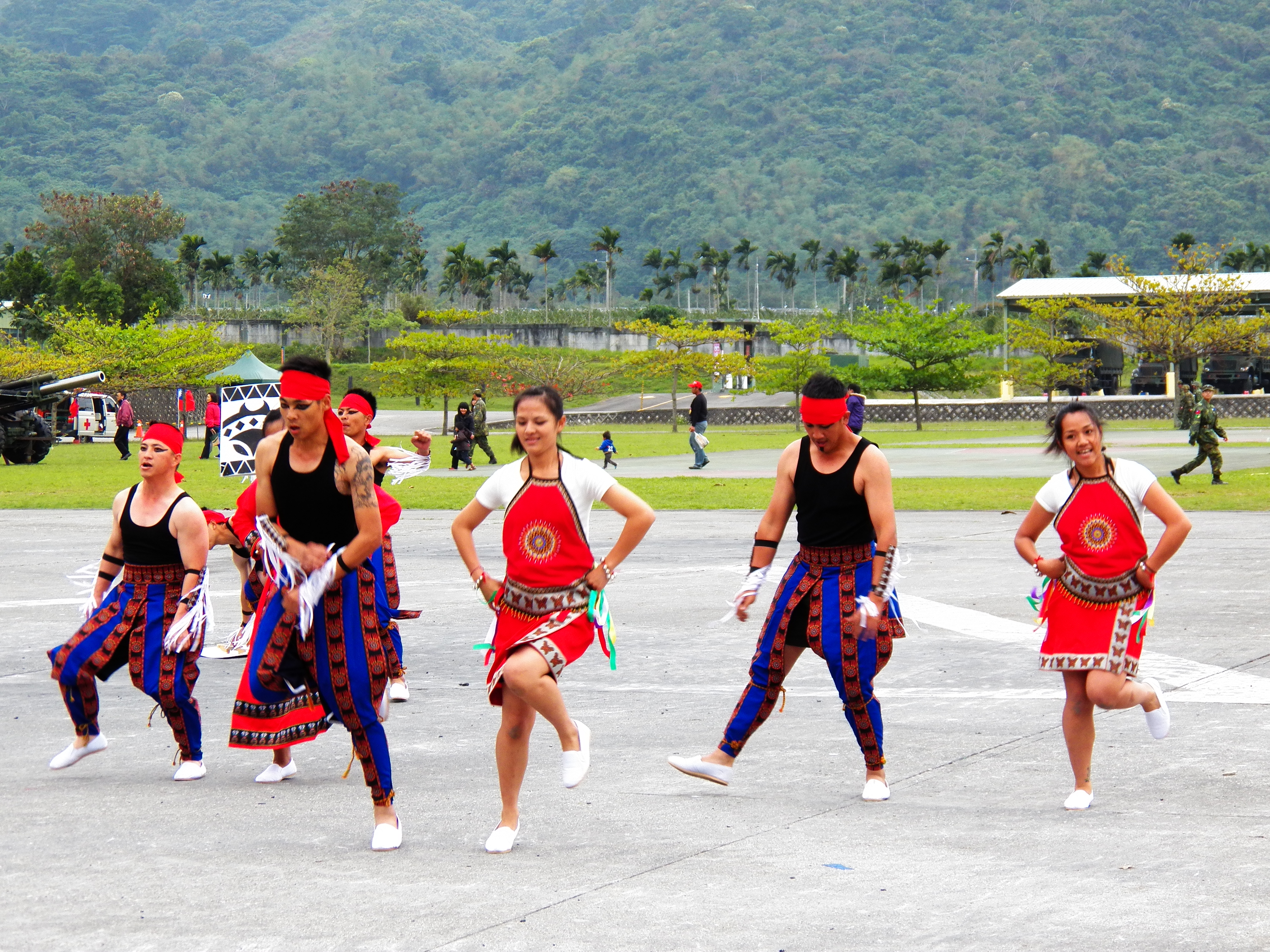 2012年陸軍臺東地區指揮部營區開放活動，原生悸動鎮東原舞社的舞蹈表演。